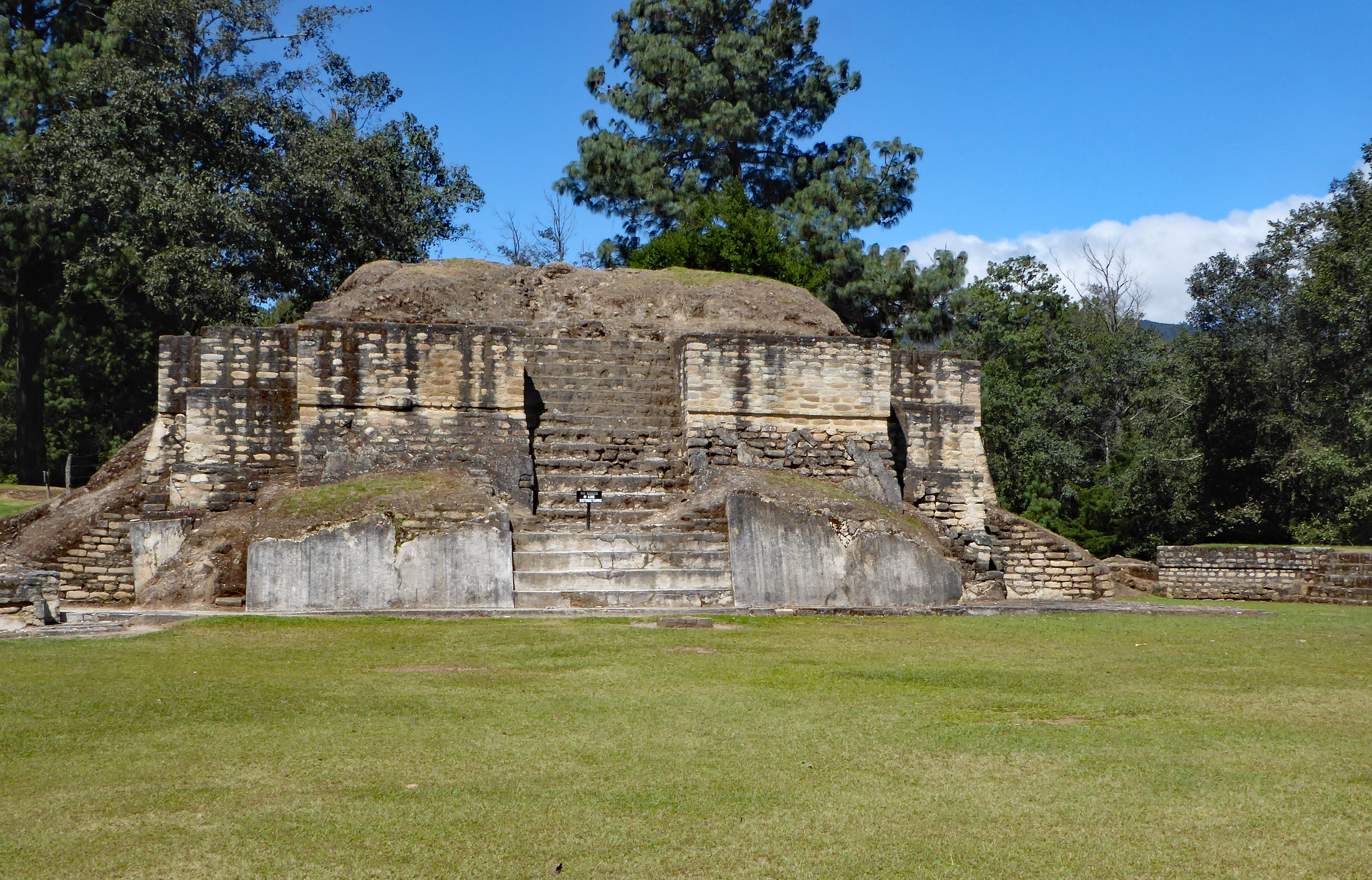 Iximché Temple 2 (2)